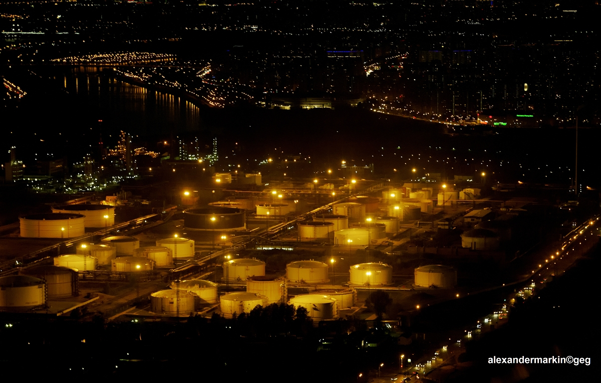 Moscow.Oil repository.Склад нефтепродуктов Московского нефтеперерабатывающего завода (само производство - левее и ниже границы кадра). Над ним видна река Москва и южный край застройки Марьина